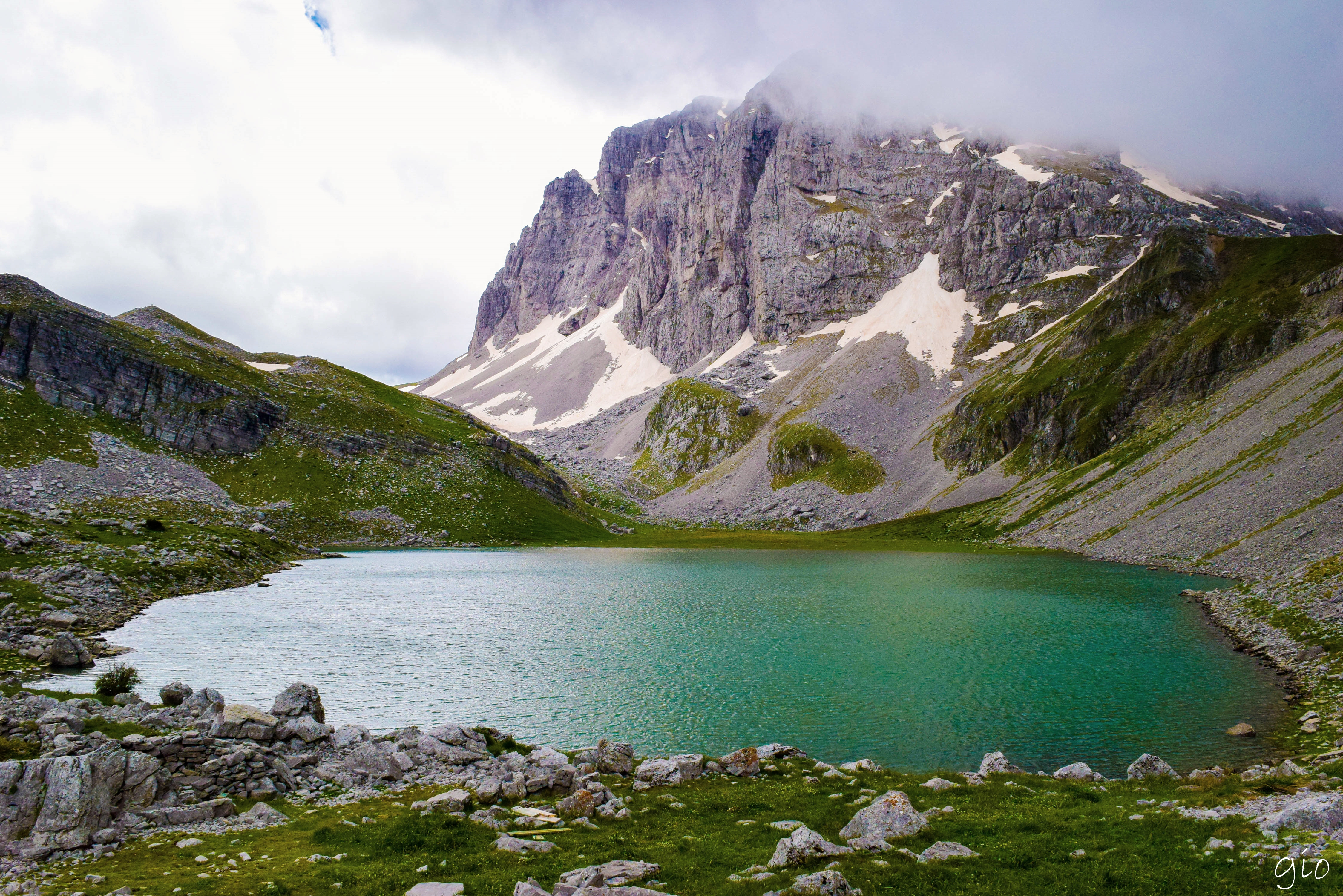 Όρος Τύμφη This is a photography of Natura 2000 protected area with ID GR2130009